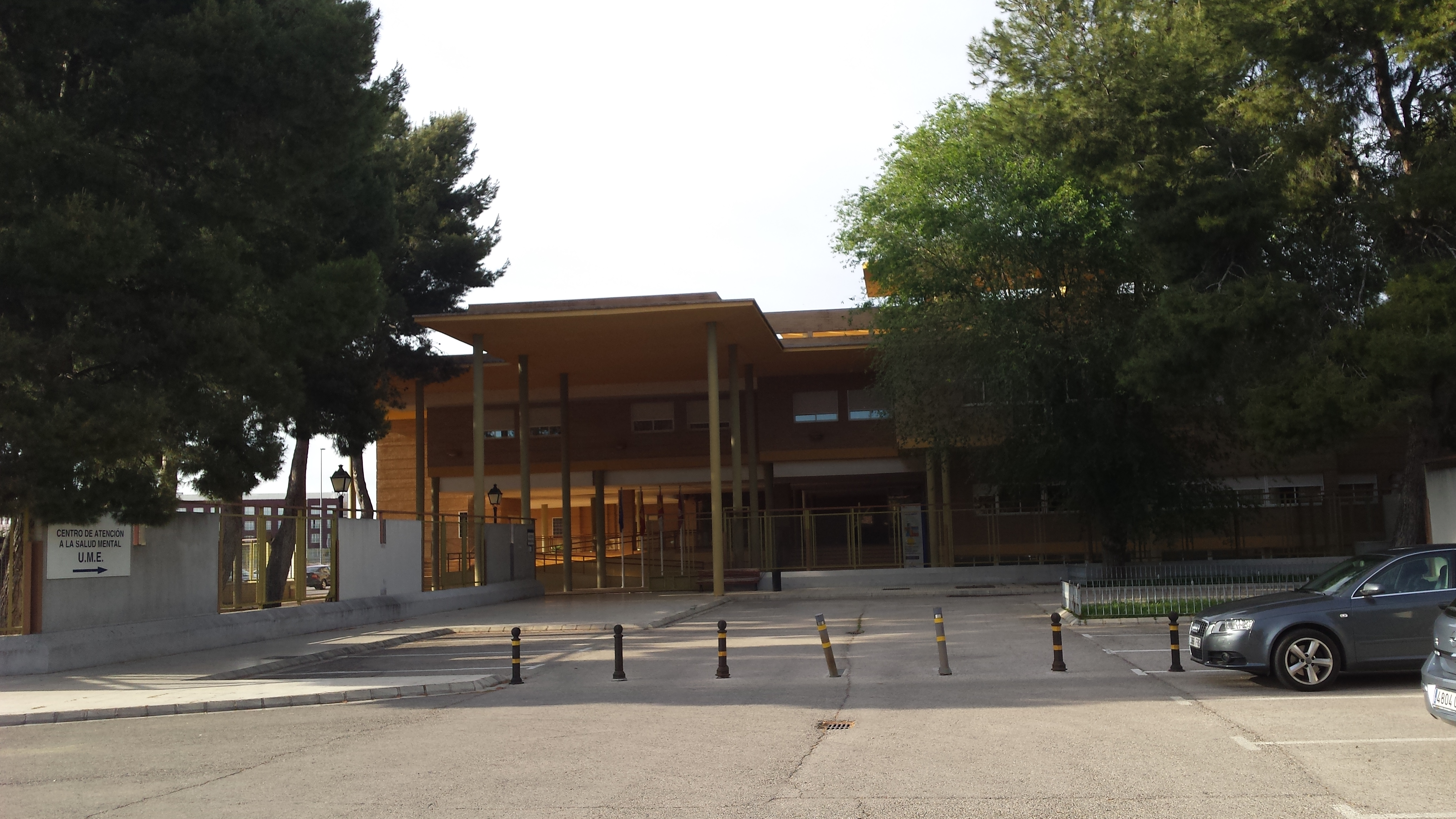 Centro de Atención a la Salud Mental de Albacete (UME). Complejo Hospitalario Universitario de Albacete (CHUA)